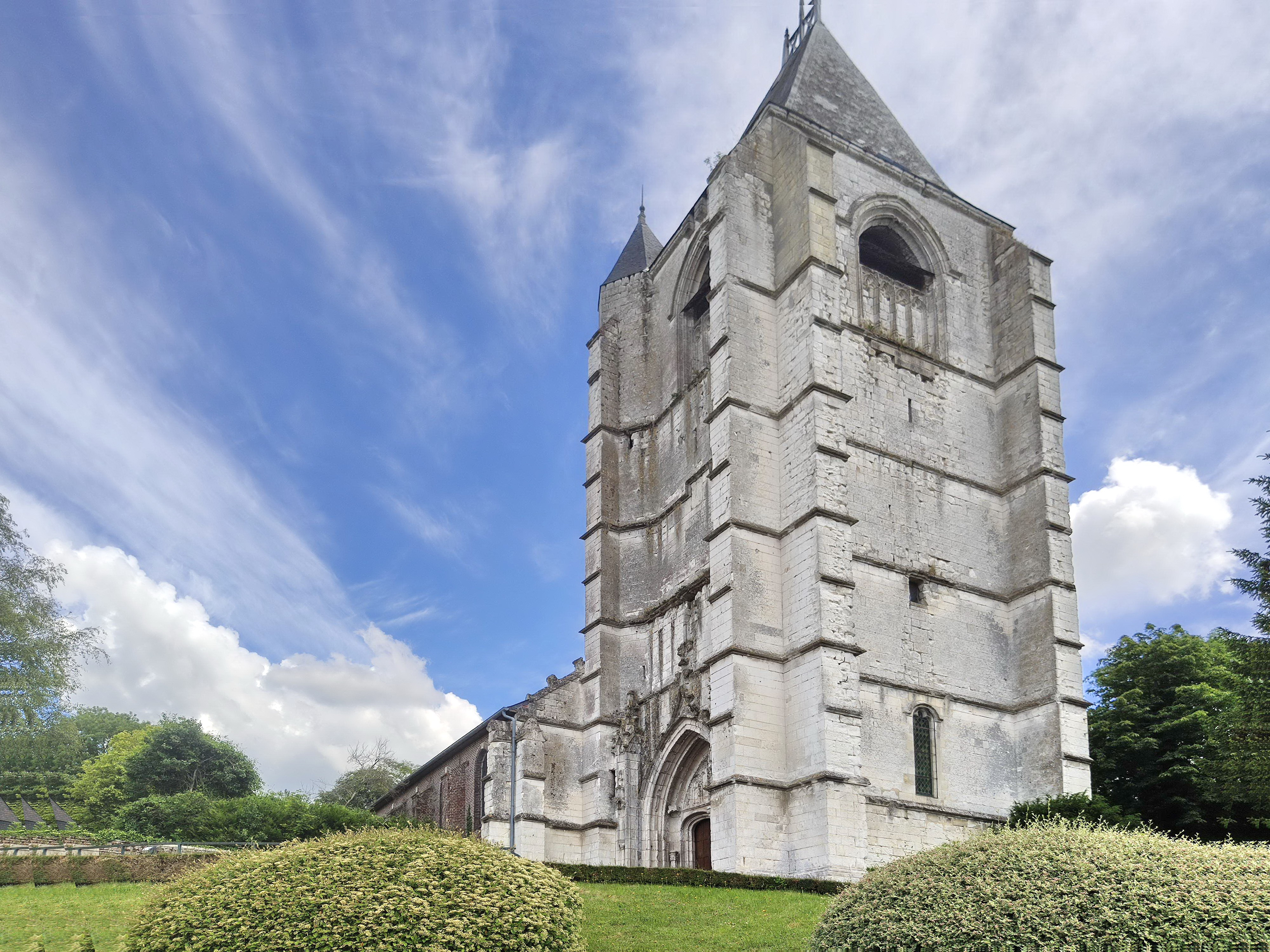 Saint-Maulvis - Eglise Saint-Maulvis